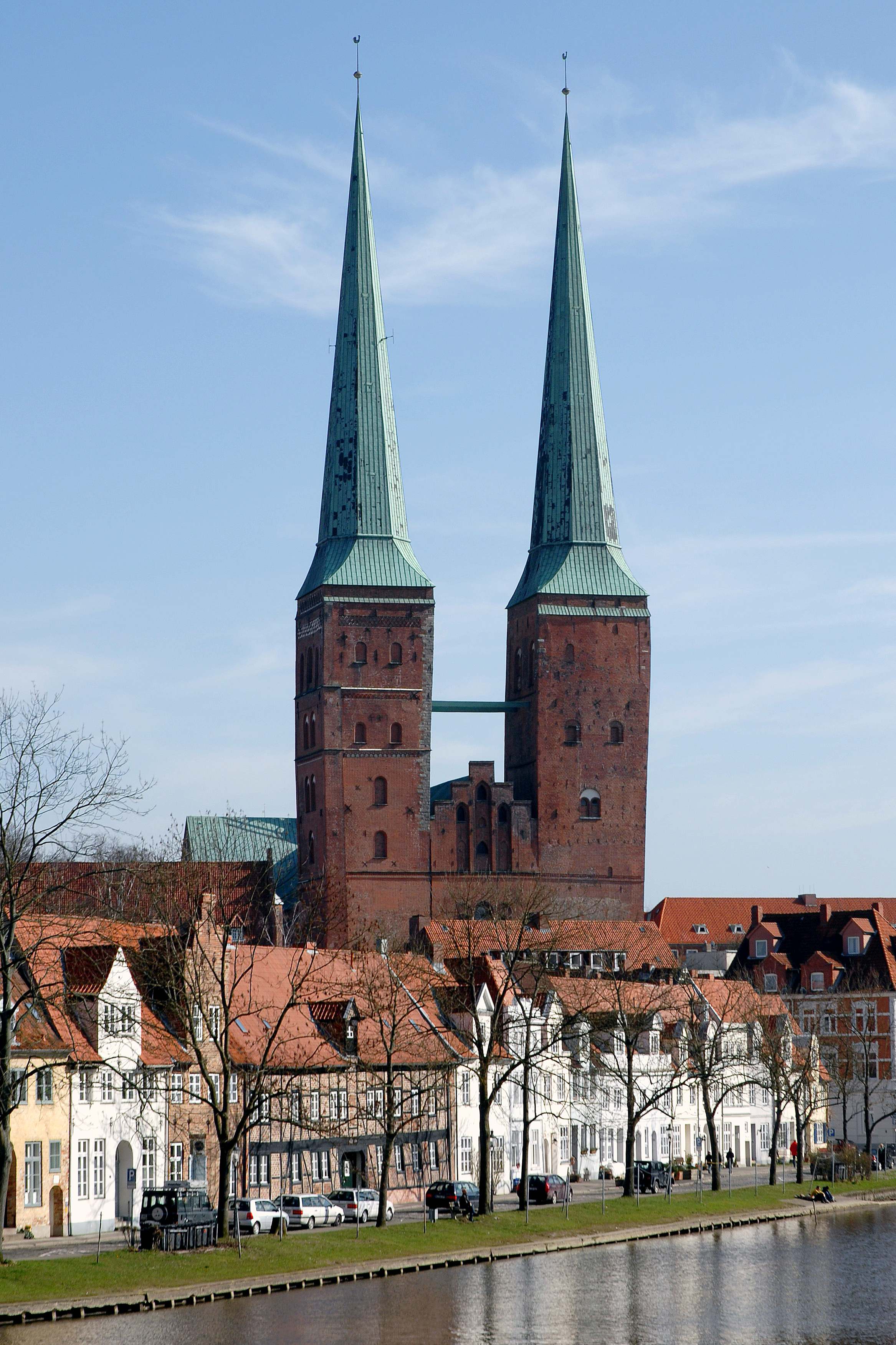 Lübecker Dom, von Westen aufgenommen